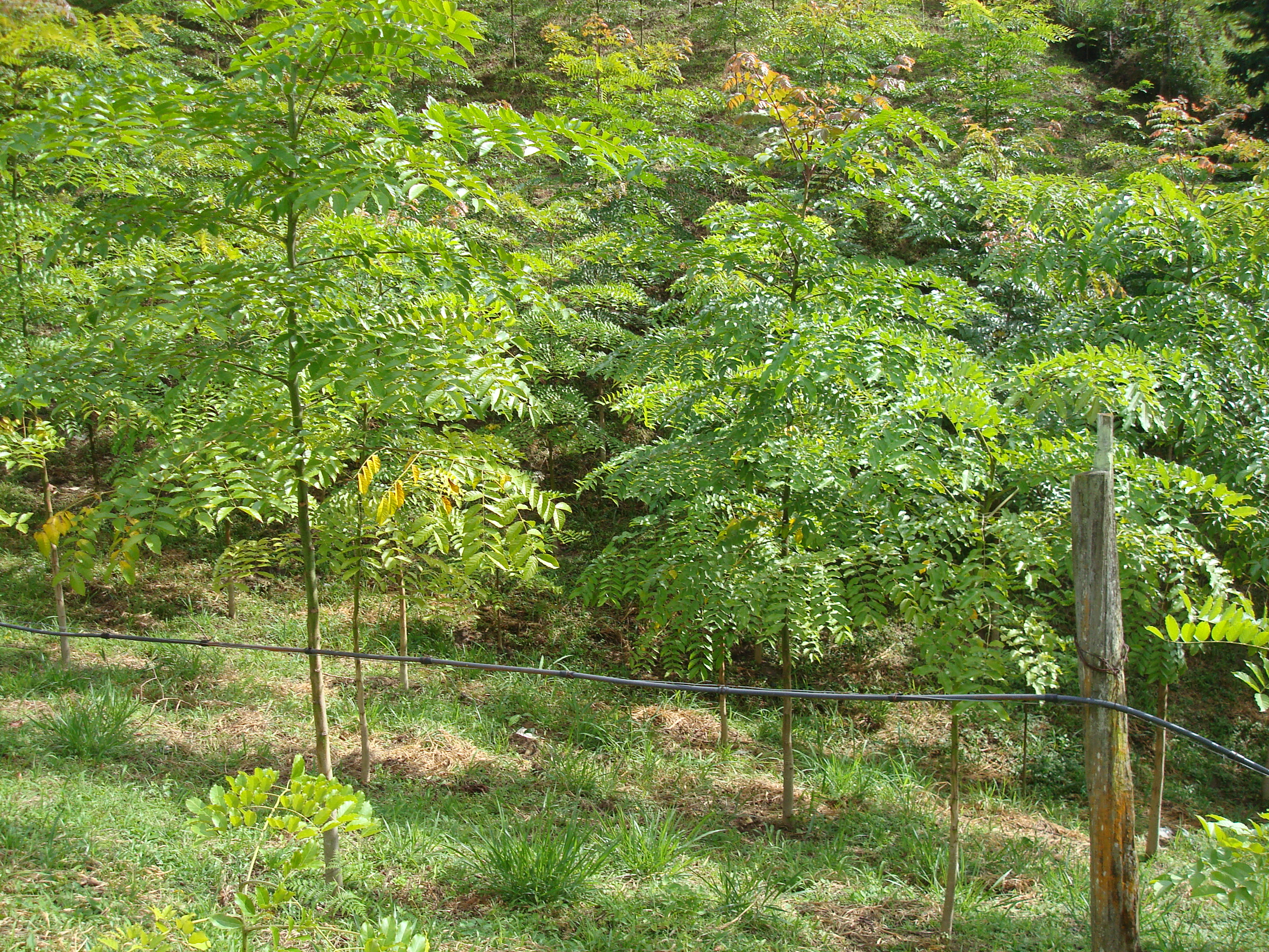 Plantación de Cedros Rosados en Santander